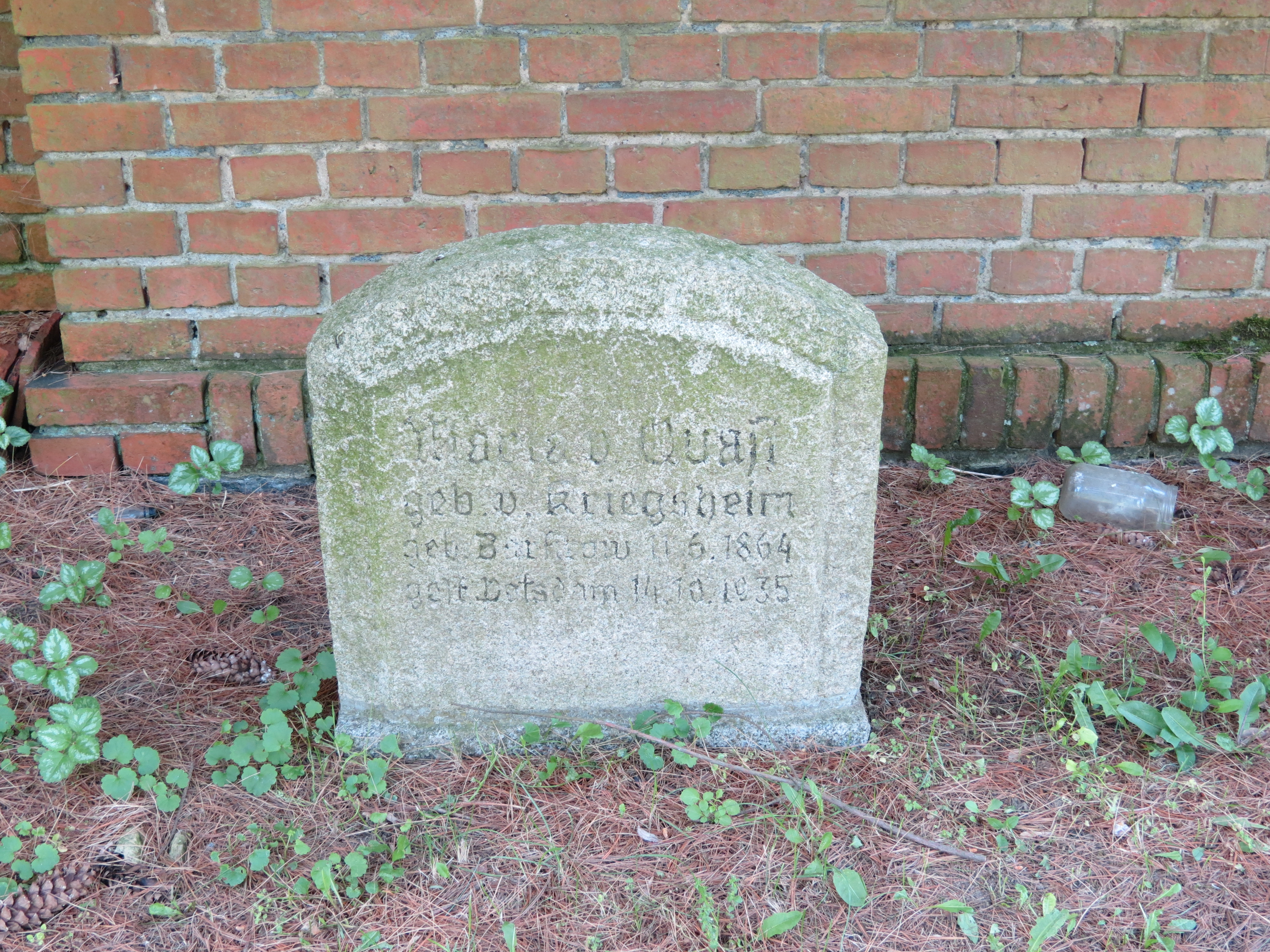 Dorfkirche Gartow, in Gartow, OT der Gemeinde Wusterhausen, Landkreis Ostprignitz-Ruppin, Brandenburg, Epitaph Maria von Quast